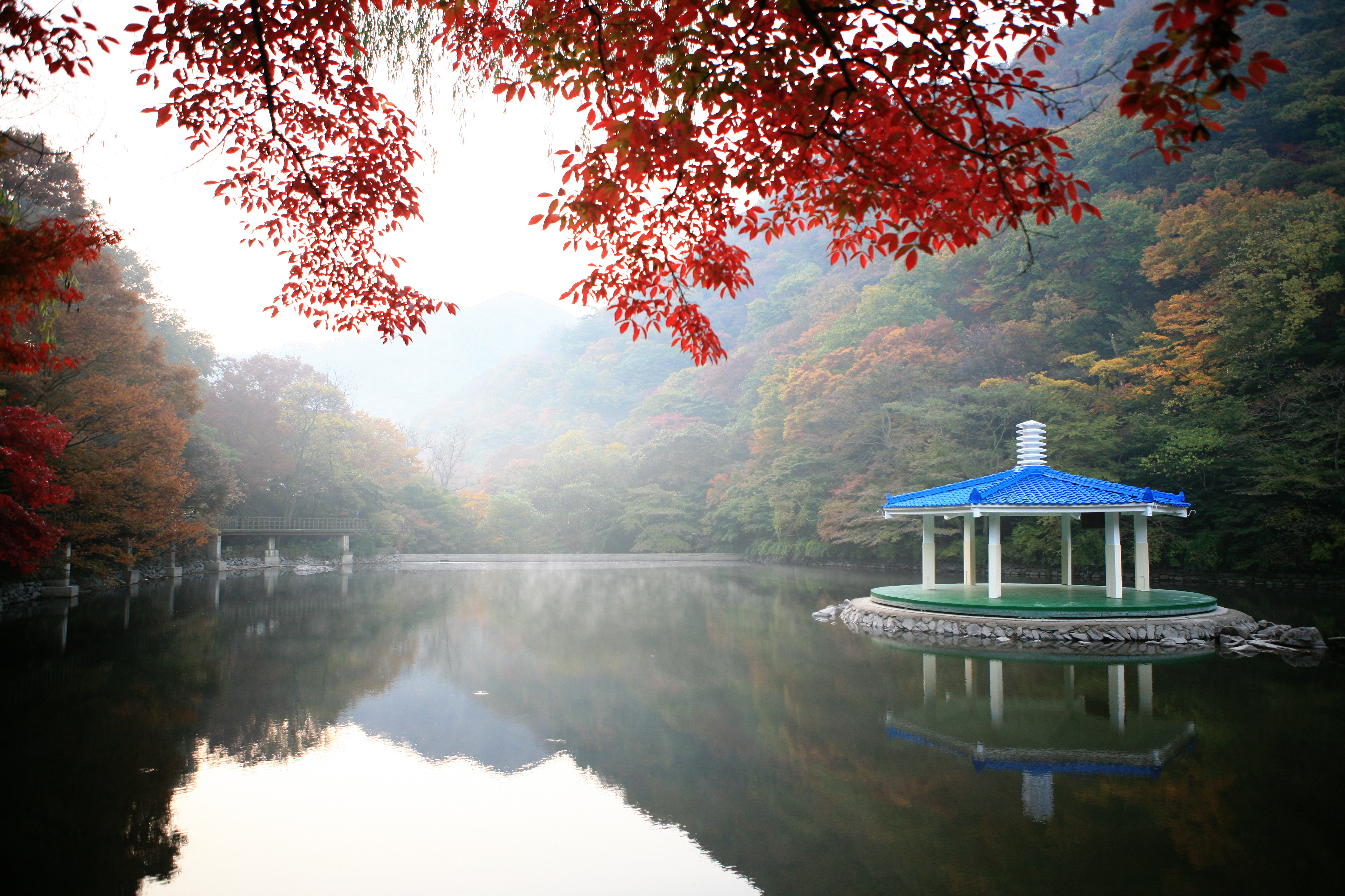 정읍 내장산 우화정의 가을 풍경.